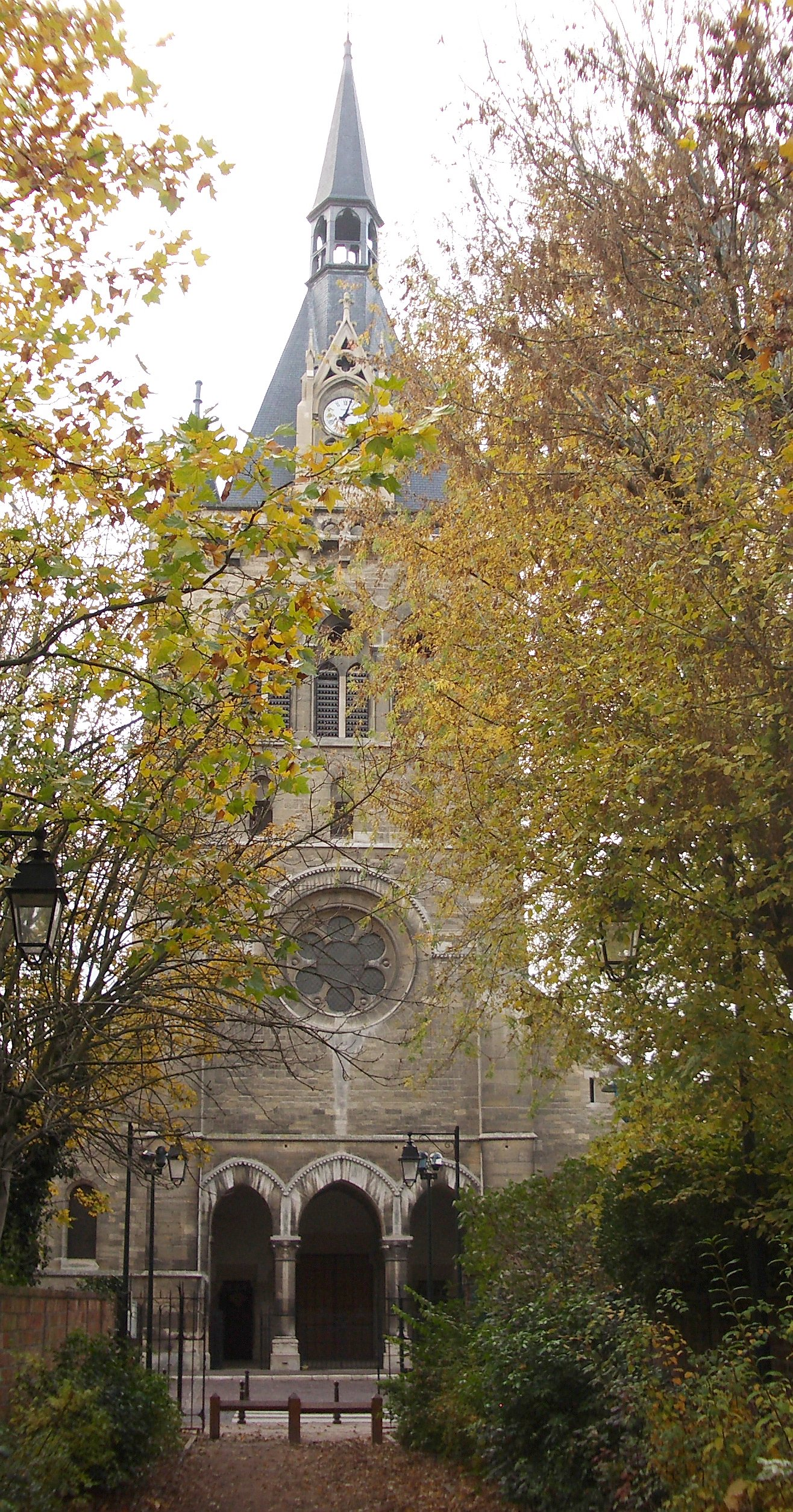 L'église Saint-Nicolas à Maisons-Laffitte, Yvelines, dans la région parisienne.